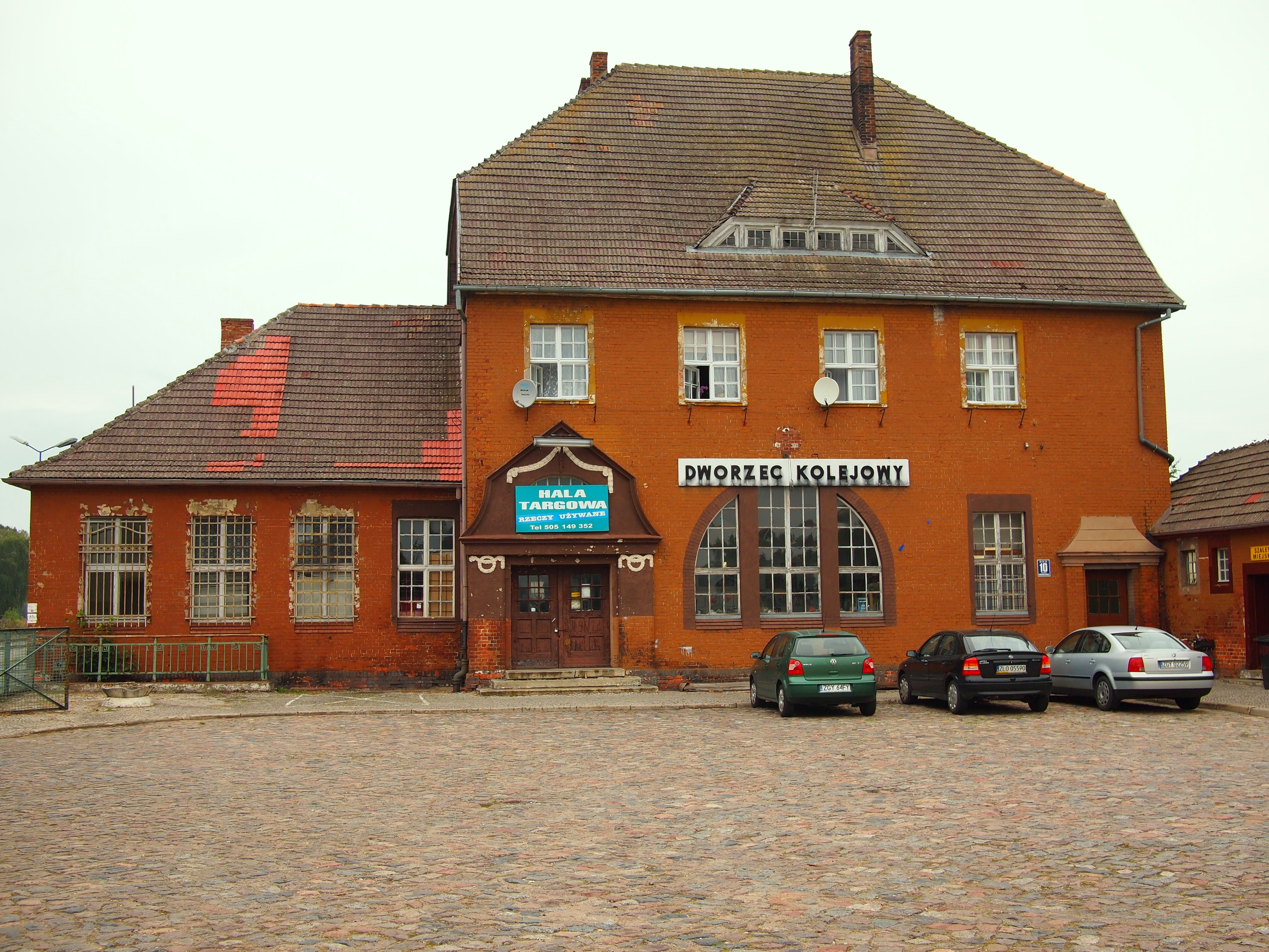 Stacja kolejowa Płoty.